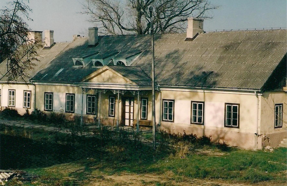 Dwór Państwa Jagnińskich na kilka tygodni przed rozbiórką.